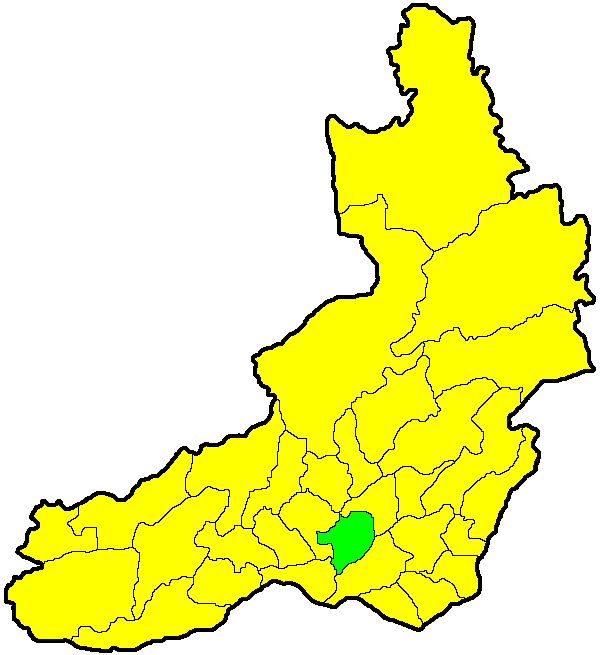 Оловяннинский район на карте Забайкальского края